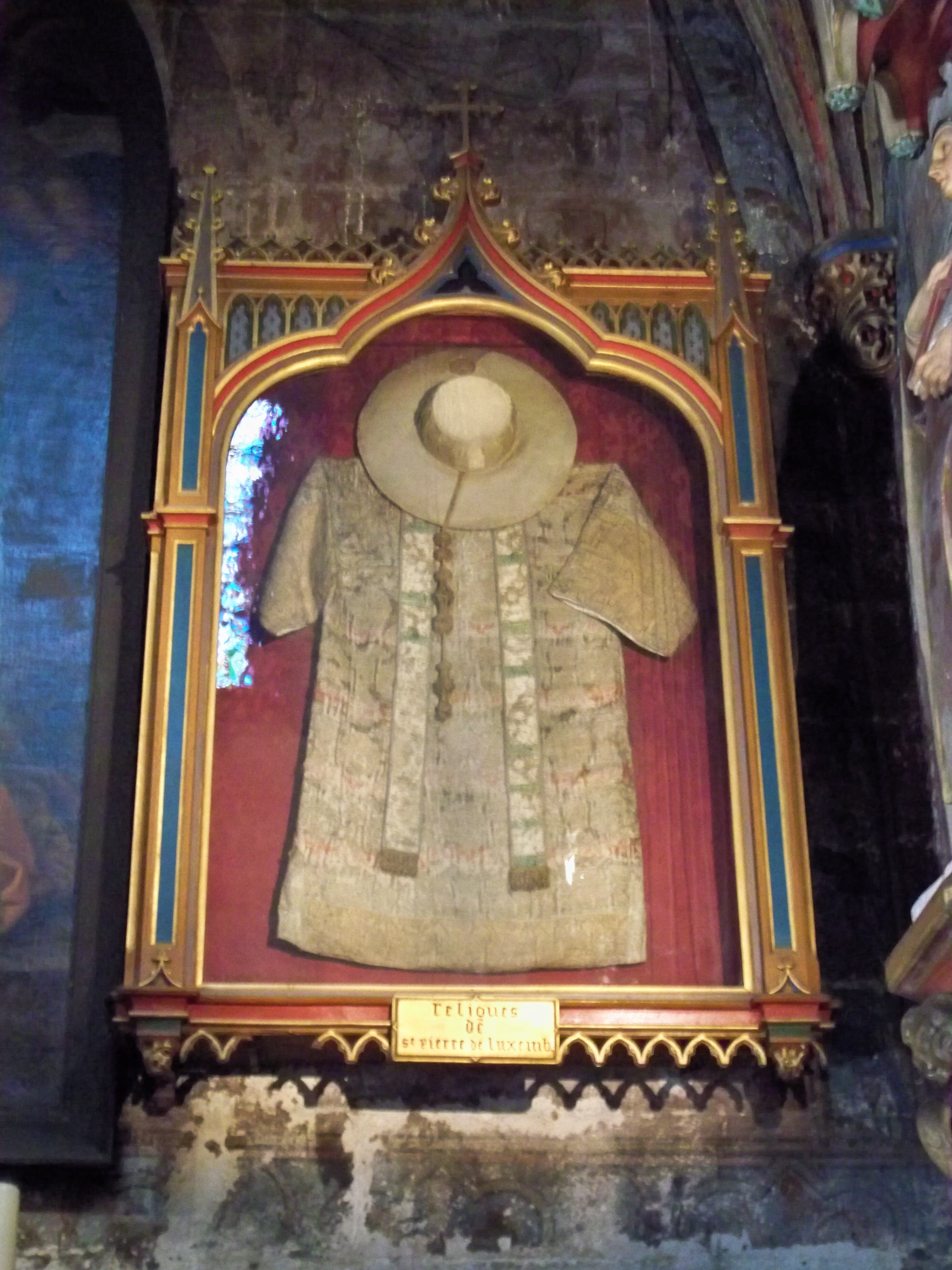 Reliques de Saint Pierre de Luxembourg, église Saint Pierre à Avignon